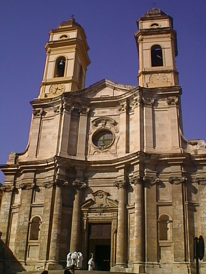 Chiesa di Sant'Anna (Cagliari)